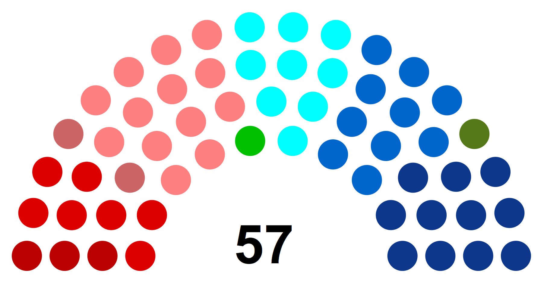 Partis politiques représentés au Conseil régional de Picardie en 1998